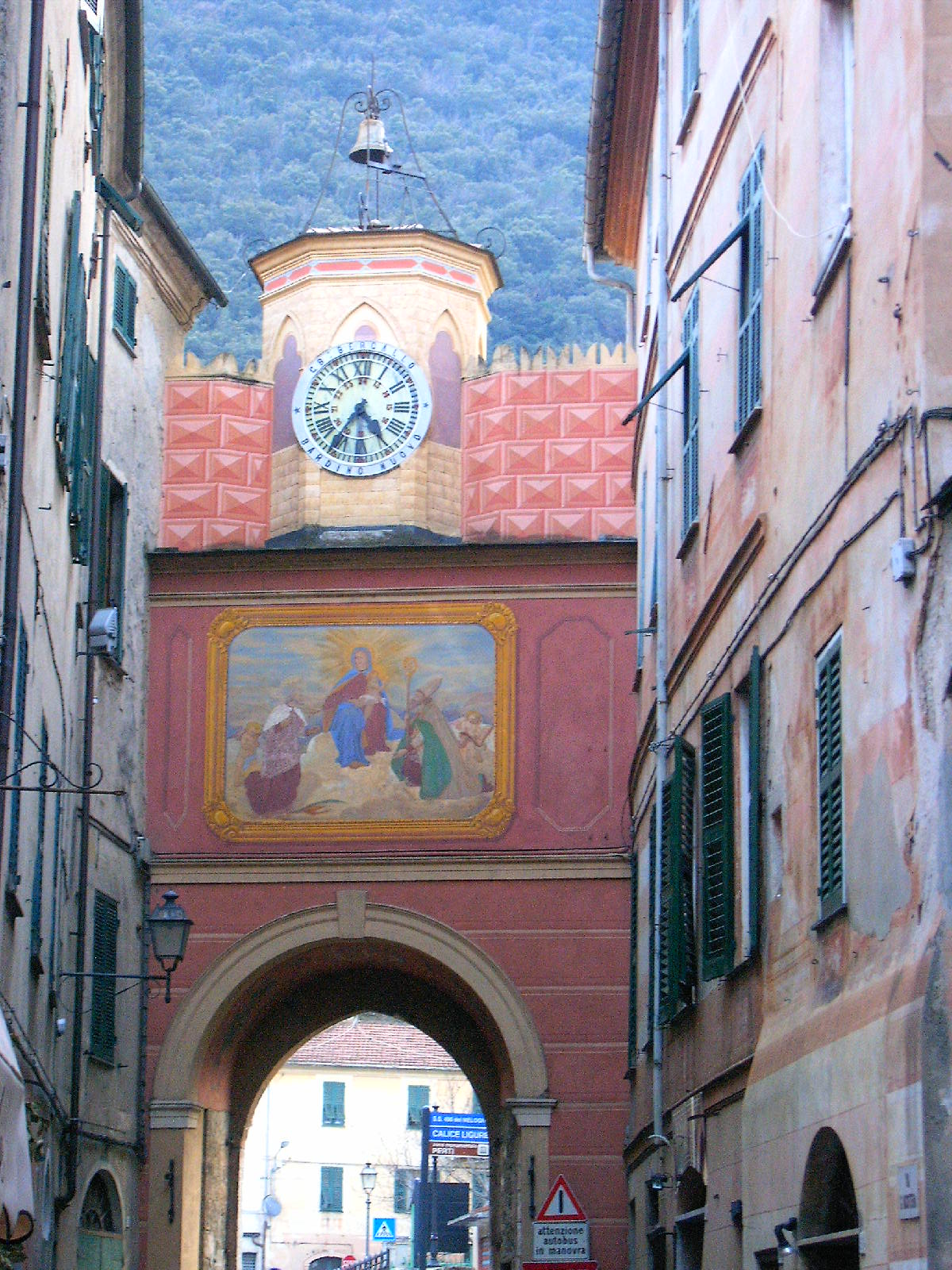 Una porta di Finalborgo, su via Nicotera (Porta Testa) A gate of Finalborgo, in Nicotera Street